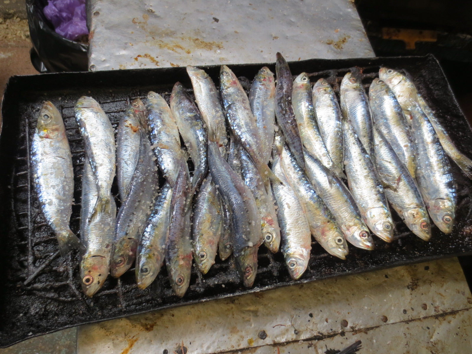 Sardine à Essaouira au Maroc